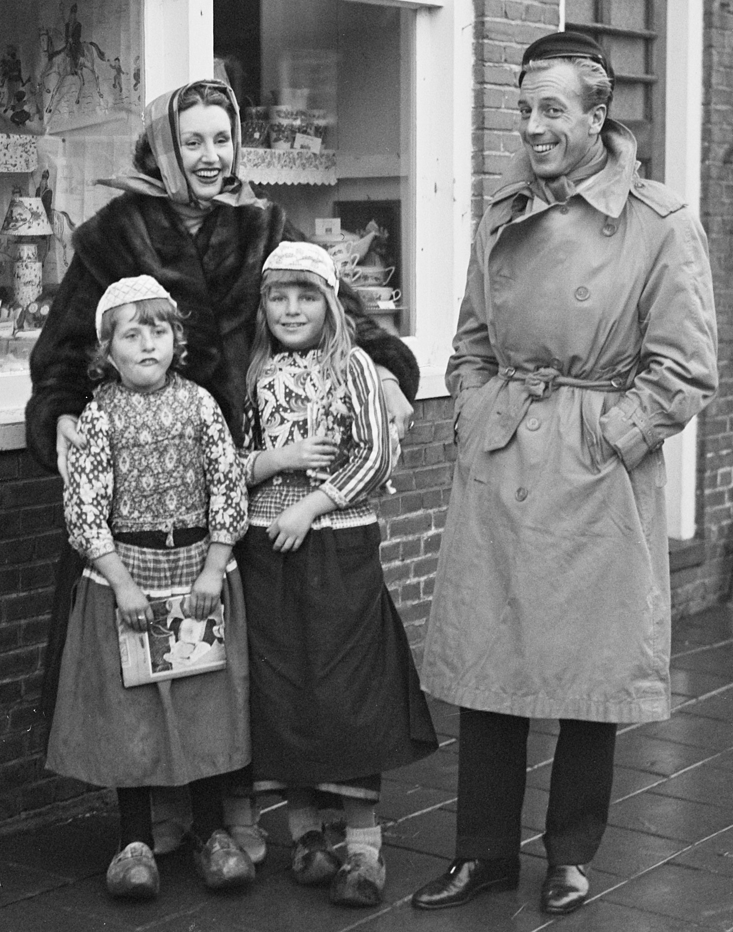 Aankomst Jacques Fath met echtgenote bij Victoria hotel